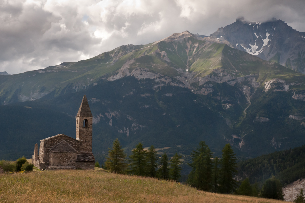 L'église de Saint Pierre d'Extravache surplombe majestueusement la ville de Bramans (massif de la Vanoise).